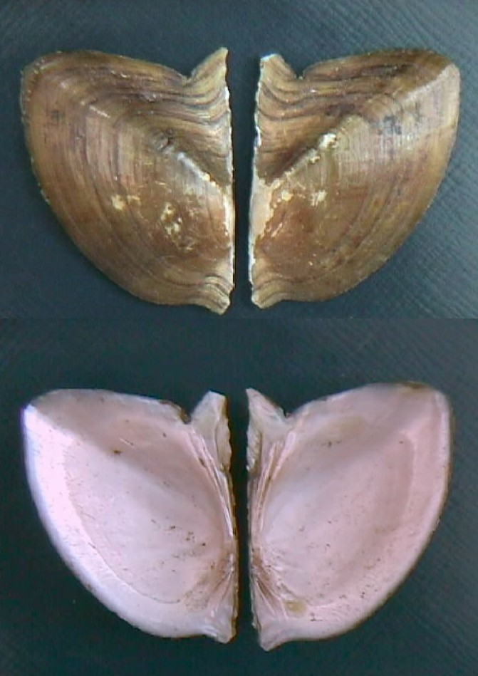 Paxydon syrmatophorus (Bivalvia – Hyriidae) de la cuenca del río Orinoco sur de estado Guárico- Venezuela